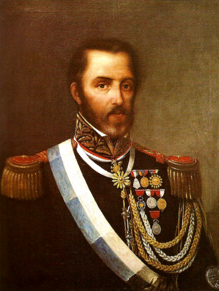 Retrato de Juan Lavalle, general unitario